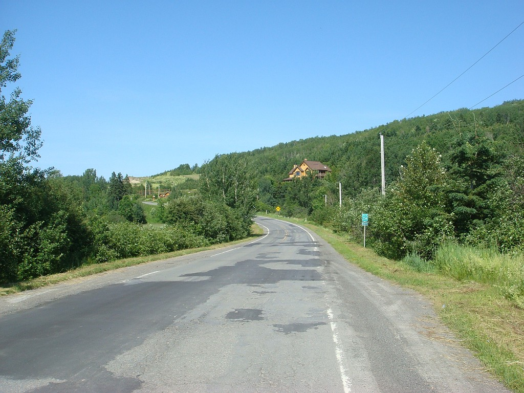 Photo de la route 234, à Price, Québec, Canada.